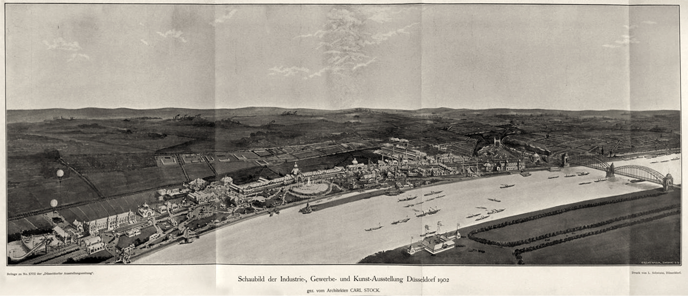 Schaubild der Industrie-, Gewerbe- und Kunst-Ausstellung Düsseldorf 1902, gez. Architekt Carl Stock, um 1901